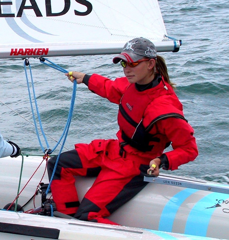 Tina Lutz